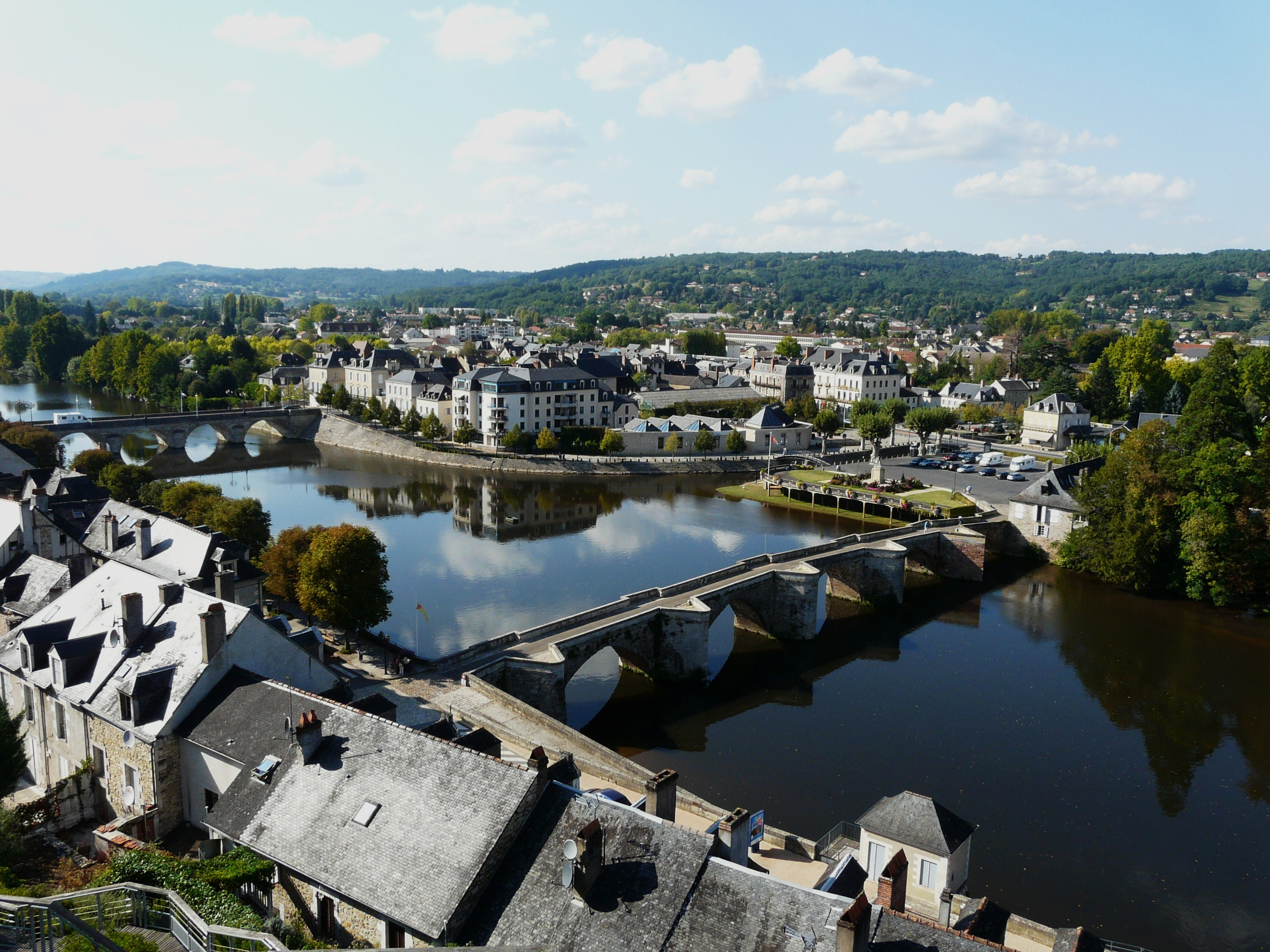 Le vieux pont de Terrasson sur la Vézère, Terrasson-Lavilledieu, Dordogne, France. À gauche, le pont neuf. .